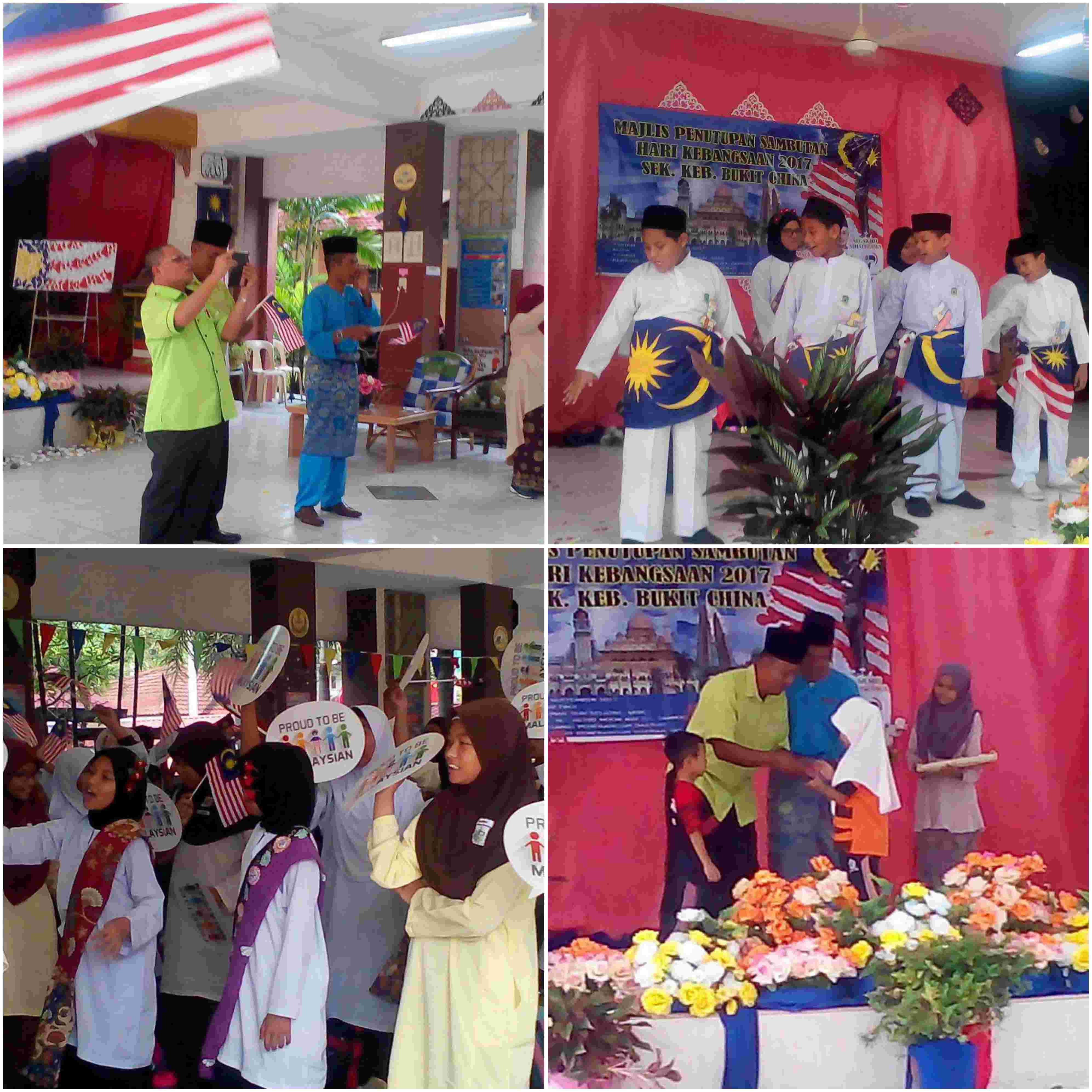 Majlis Penutup Hari Kebangsaan